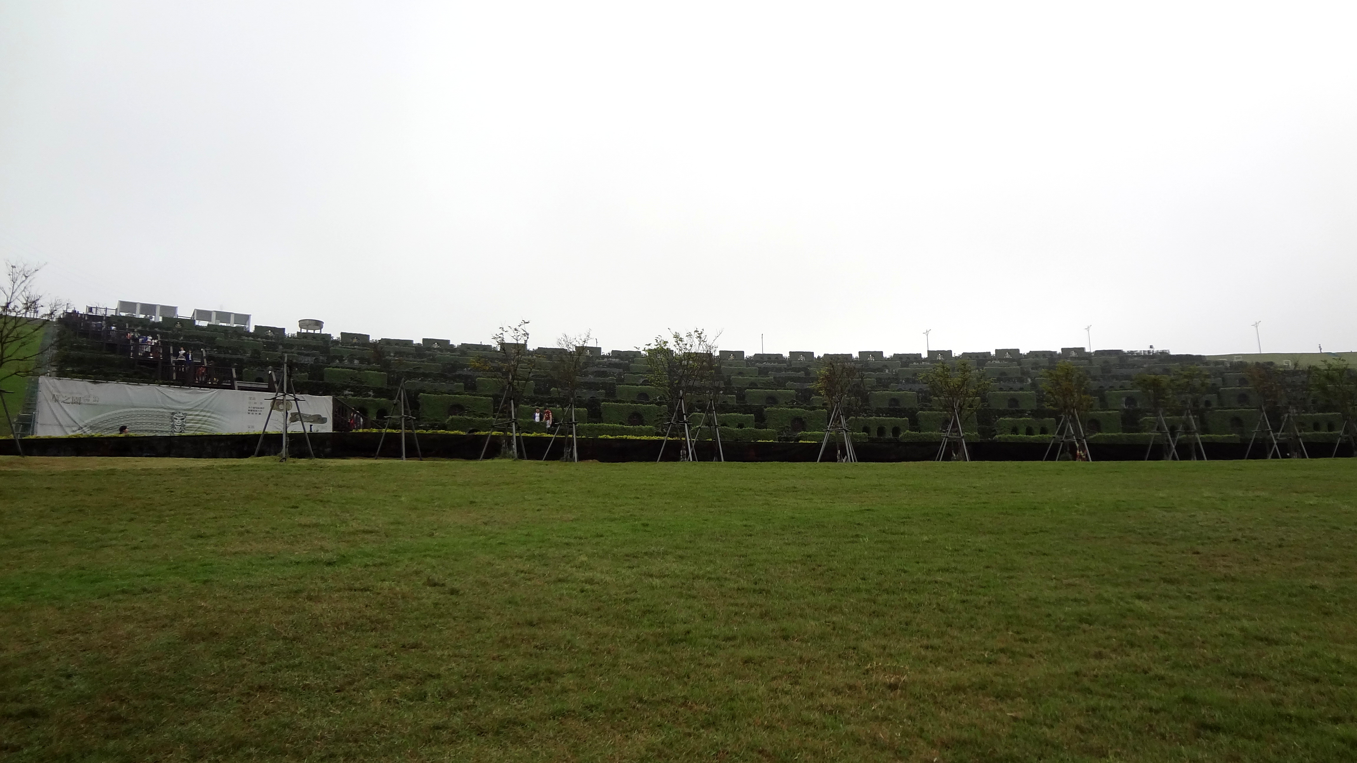 擁恆文創園區草之園。